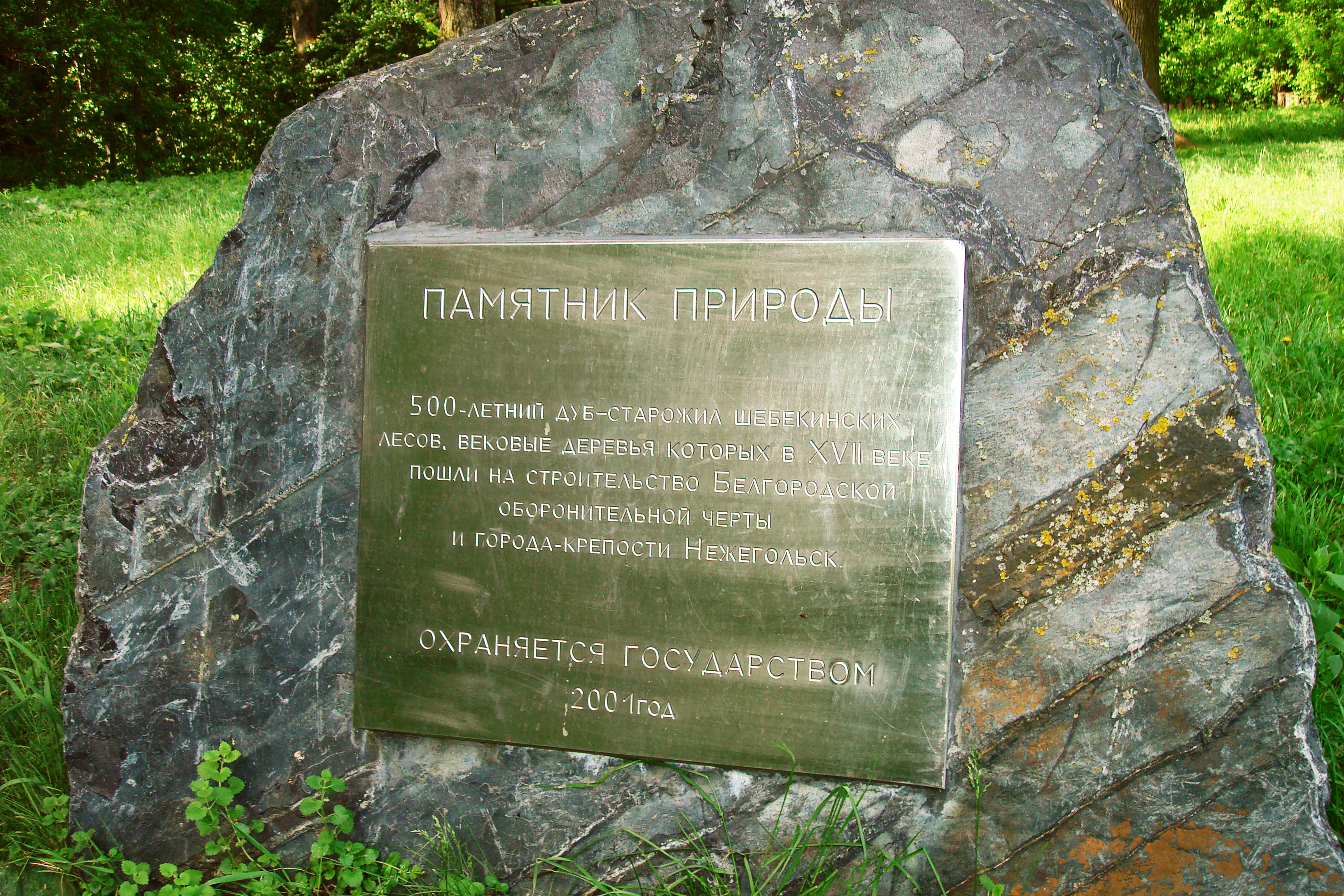 Памятная табличка у 550-летнего Панского дуба в с. Яблочково Шебекинского района Белгородской области